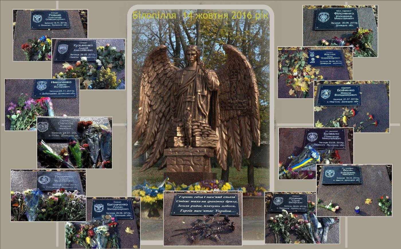 Автор - заслужений художник України з міста Хмільник на Вінниччині Віктор Стукан